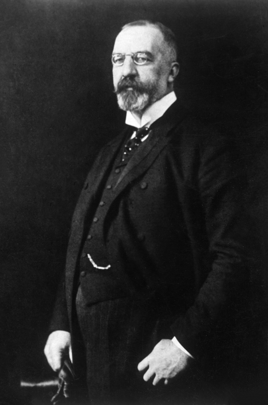 Karl Reichsgraf von Stürgkh (1859 - 1916), Prime Minister of Austria from 1911 to 1916; killed by Friedrich Adler on 21.10.1916